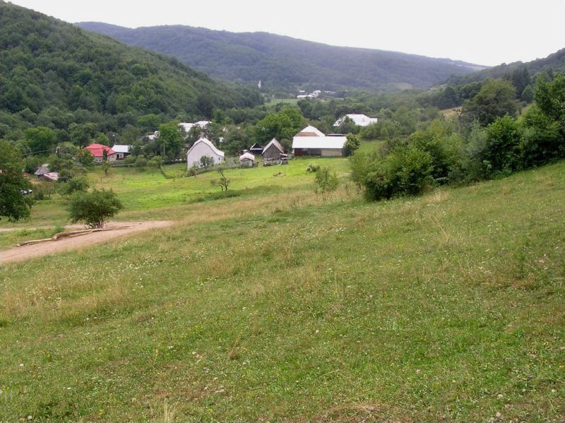 DescriptionCelkový pohľadDate25 June 2006SourceOwn workAuthorAndrej BelovežčíkPermission (Reusing this file) anoCelkový pohľad